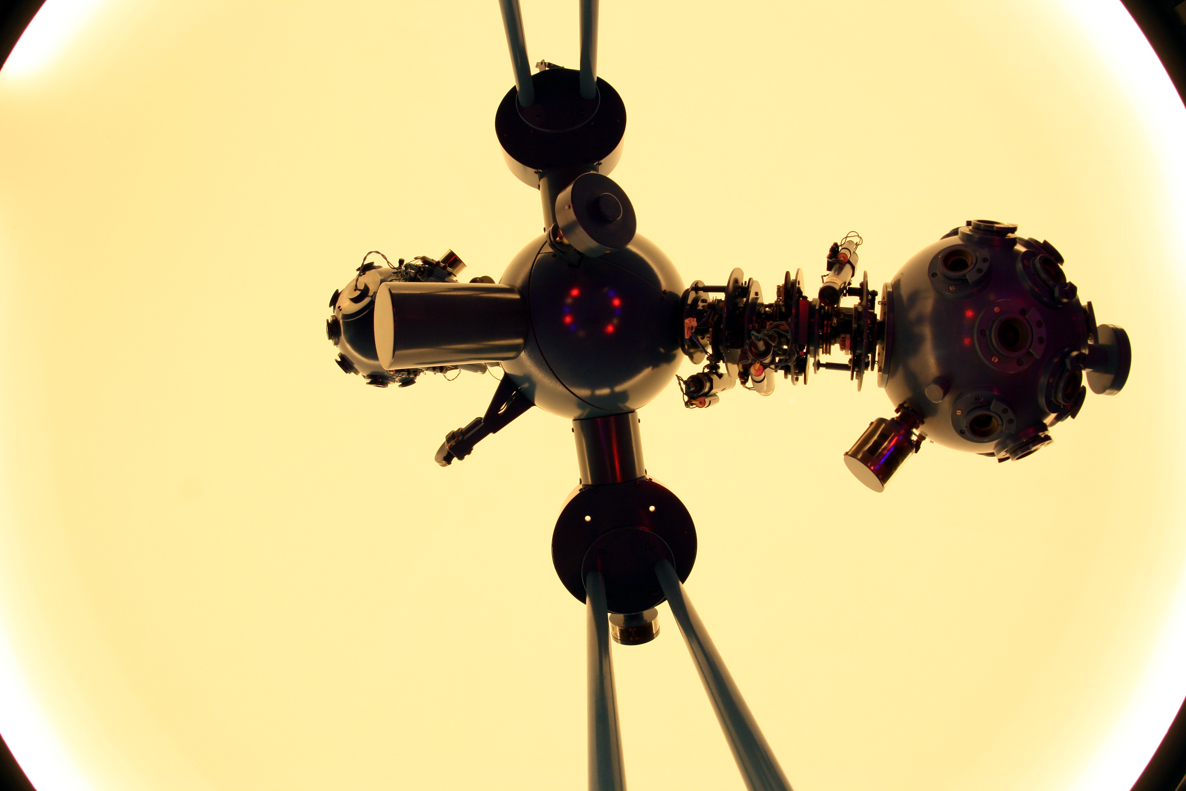 ZKP 2 Projektor Untenansicht